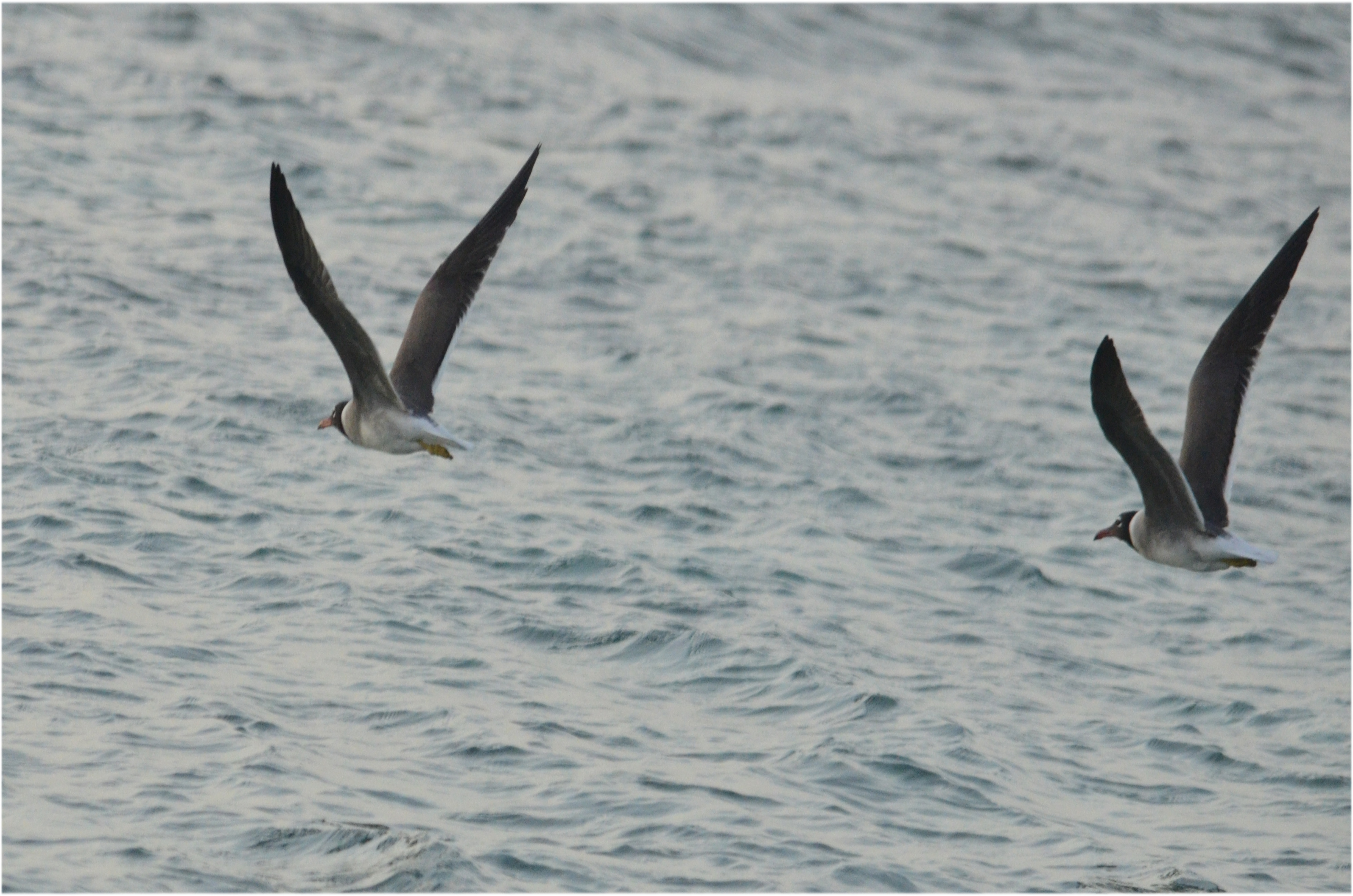 نورس أبيض العين قرب محمية نبق